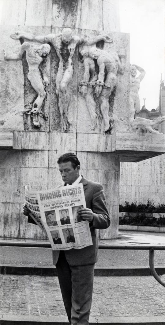 Harmsen, E.J. (Boerenpartij / Groep Harmsen). Lijsttrekker Harmsen van BindingRechts bij de start van de verkiezingstournee met een verkiezingskrant van de partij bij het Nationaal Monument op de Dam. Nederland, Amsterdam,. 19 april 1971.